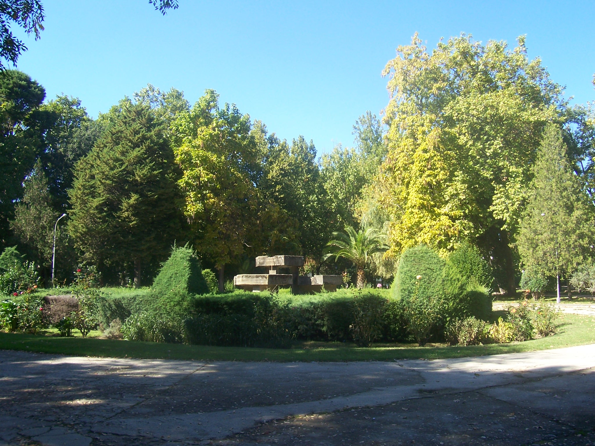 Una de las fuentes del Parque Municipal Príncipe, en Montehermoso, Cáceres, España